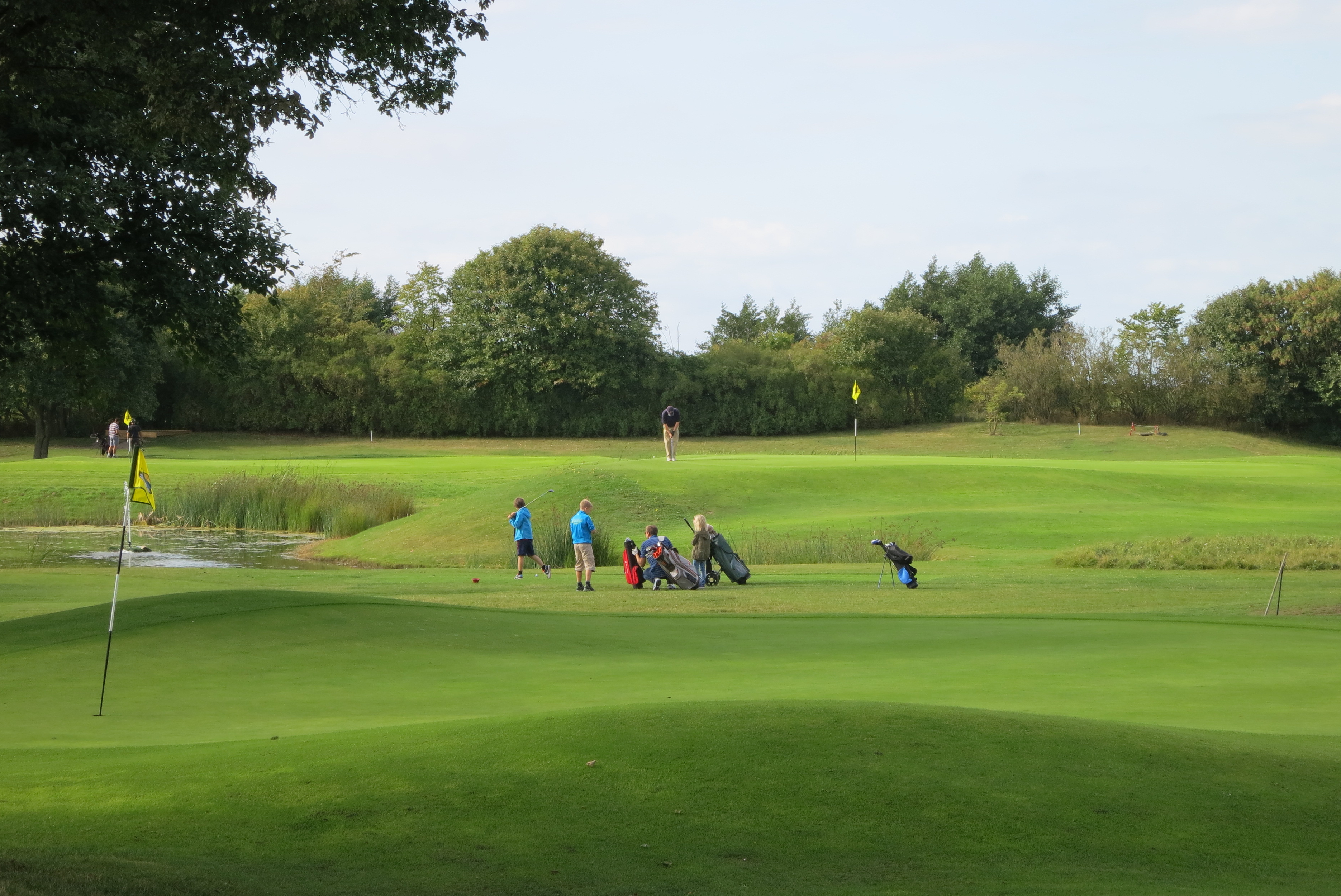 Hylliekrokens golfbana, Limhamnsfältet, Malmö